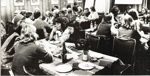 fra det siste møtet i Engebret-bevegelsen. I "Kvinner i media", s. 32 står det at bildet er fra et møte "vår 1985". I M. Utheims avhandling "Engebret-bevegelsen", s. 117, er en oversikt over bevegelsens møter. Våren 1985 ble det bare arrangert ett, det siste i regi av bevegelsen: 18.03.1985